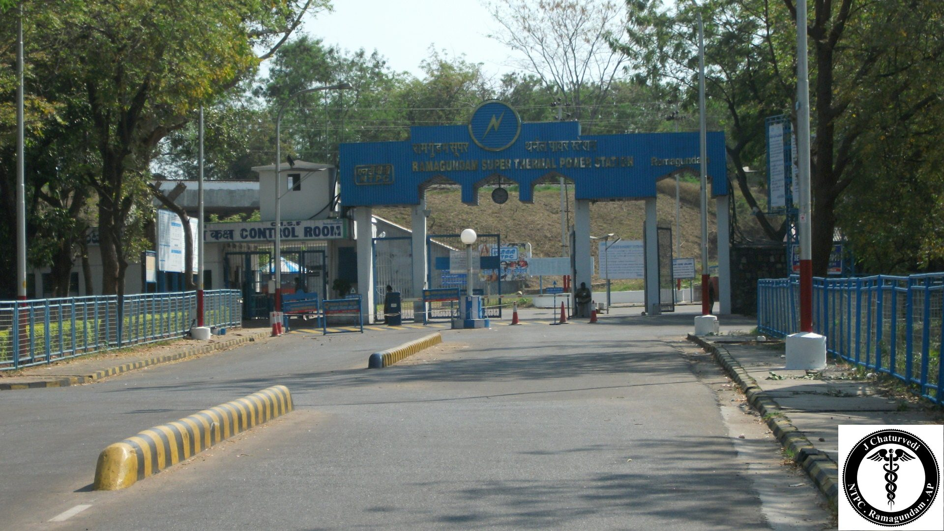 Main Gate, RSTPS, NTPC, Ramagundam, AP